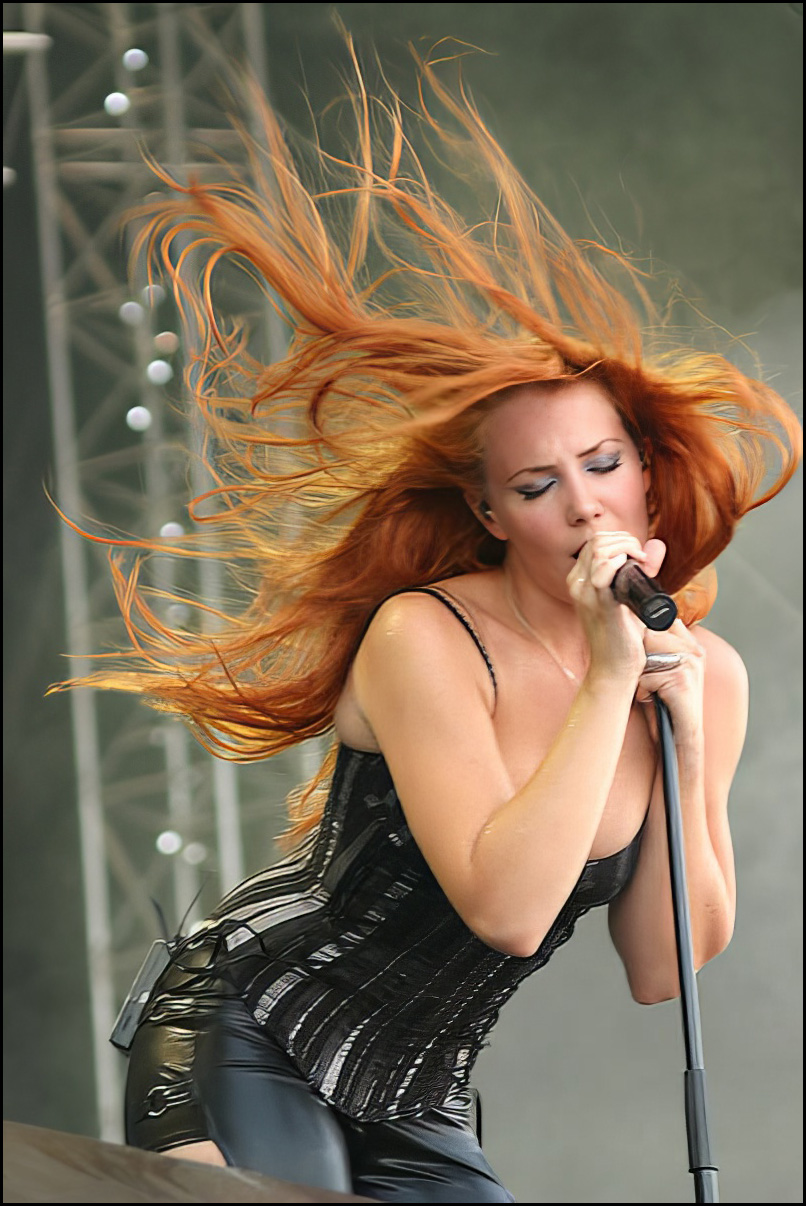 Simone Simons, Sängerin von Epica. Konzertfoto vom Mera Luna